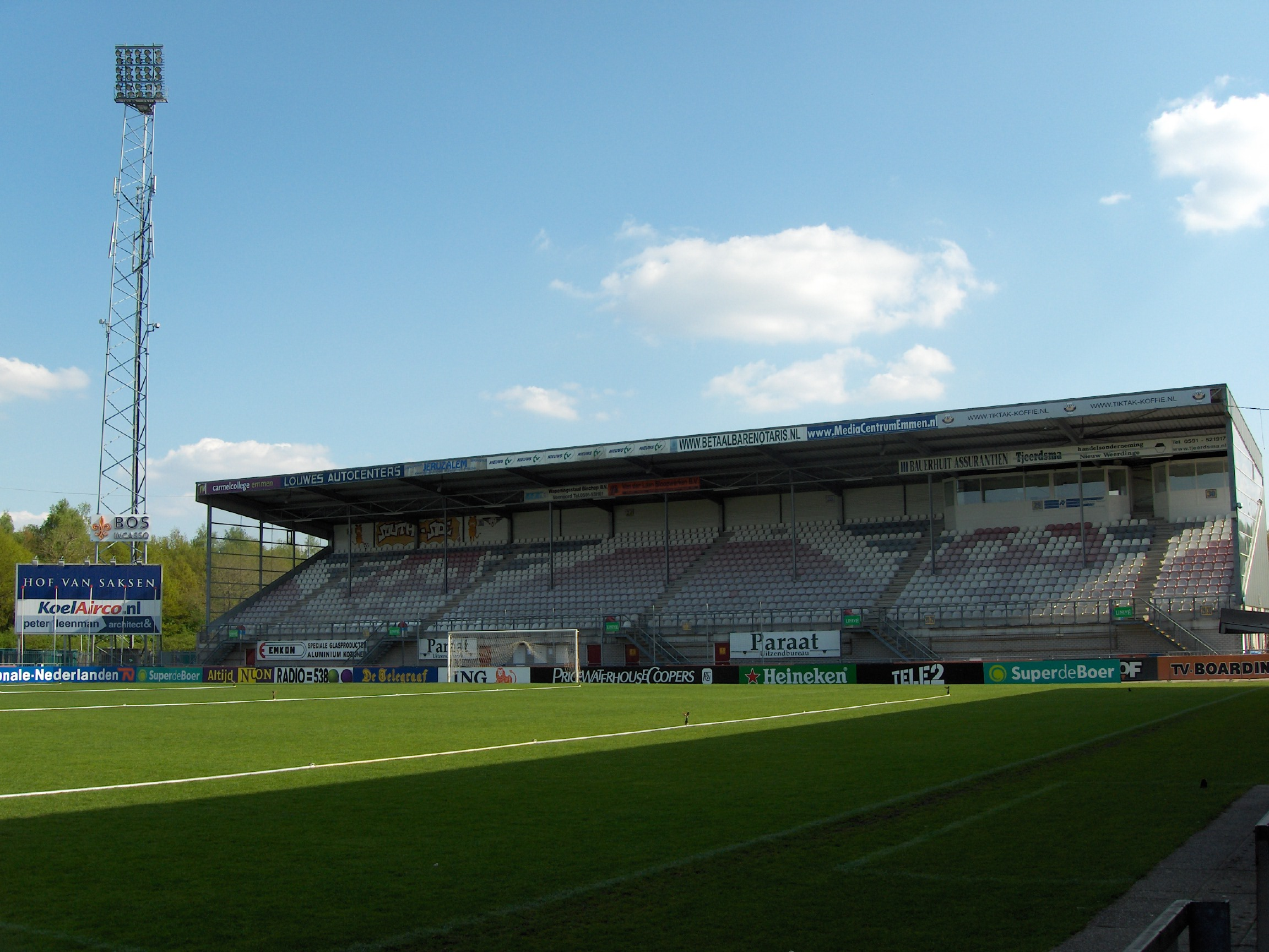 Univé Stadion Zuid